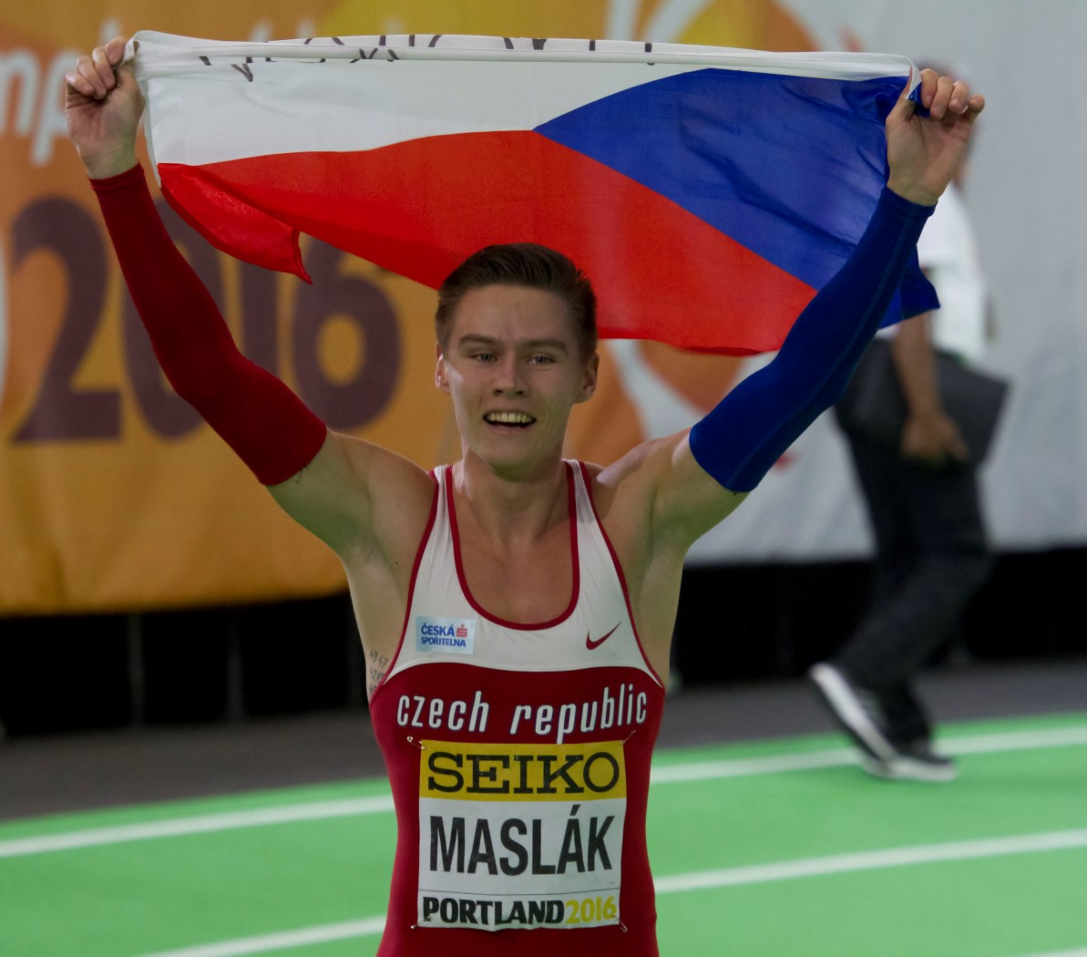 498 maslak